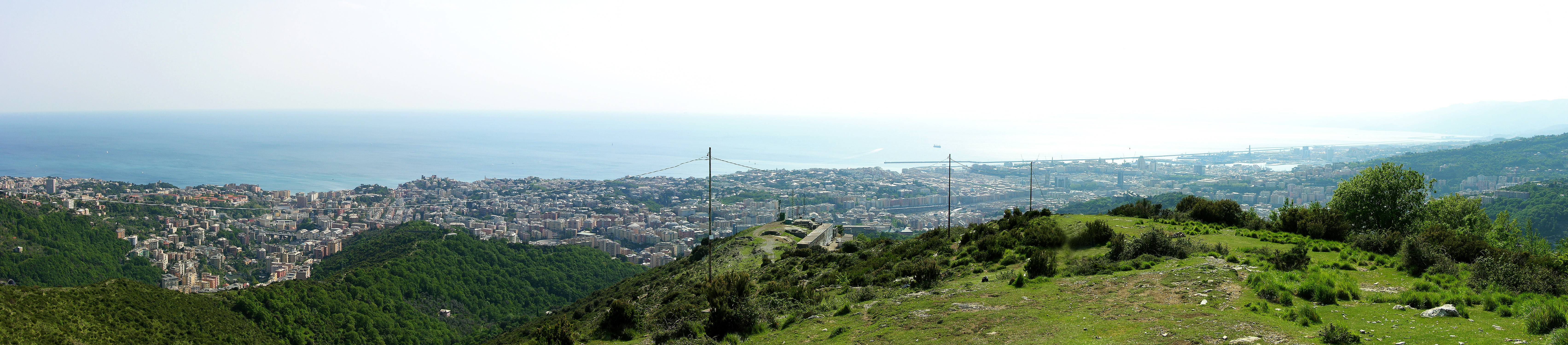 Panorama di Genova dal forte Richelieu.